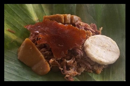 Plato de lechona típica tolimense con insulso y arepa